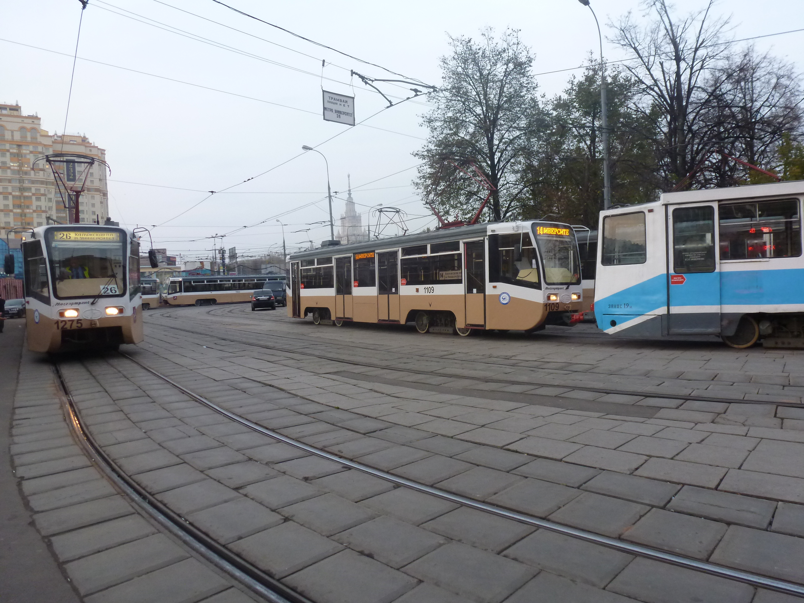 Fina tramstacio sur la placo de Ĝavaharlal Neru, metrostacio "Universitet", Moskvo